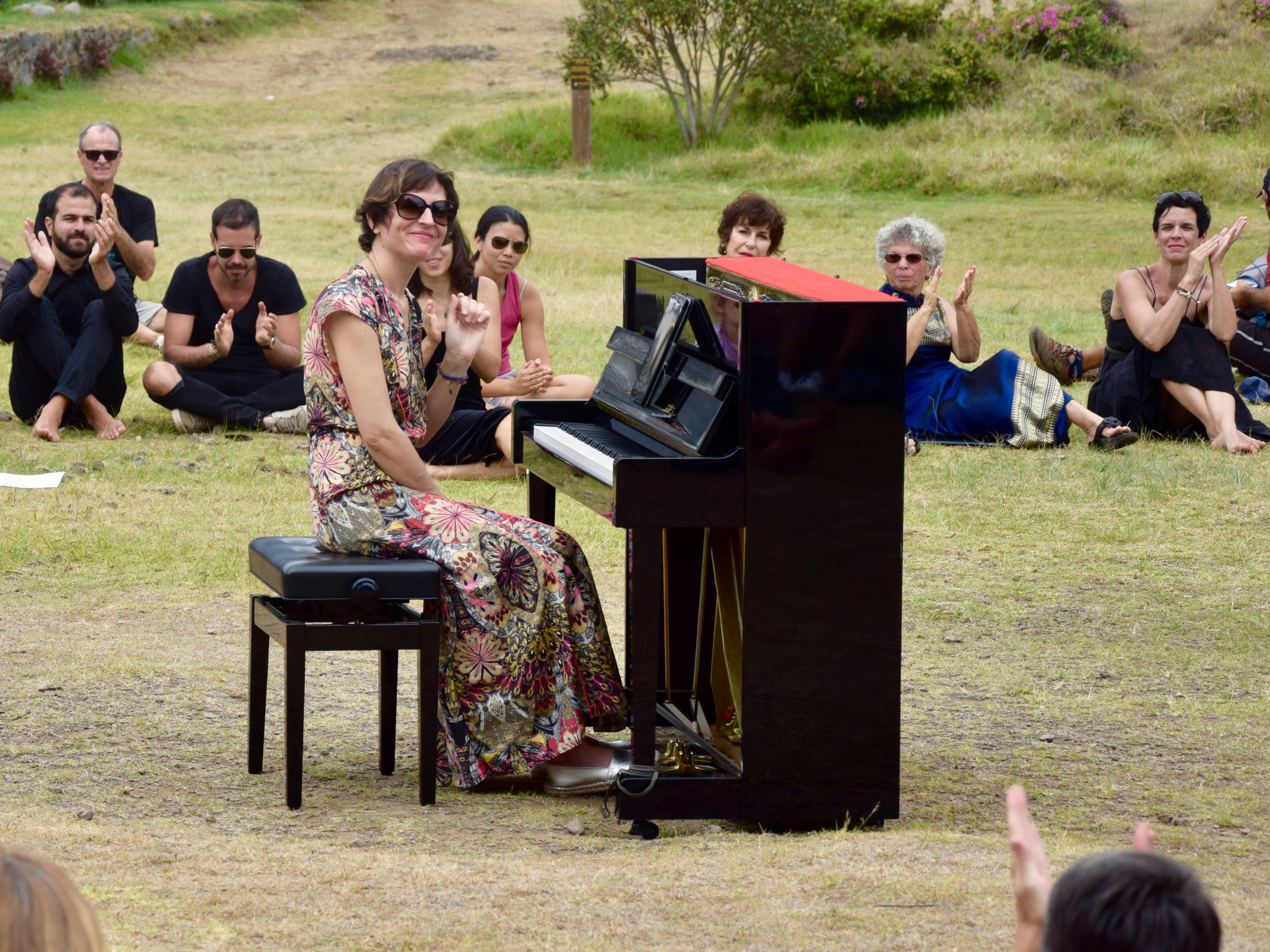 La pianiste Vanessa Wagner en concert à La Nouvelle, Mafate, Réunion le 27 novembre 2016 lors du concert LangTang Classik Festival